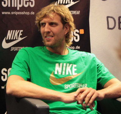 Dirk Nowitzki bei Snipes in Frankfurt